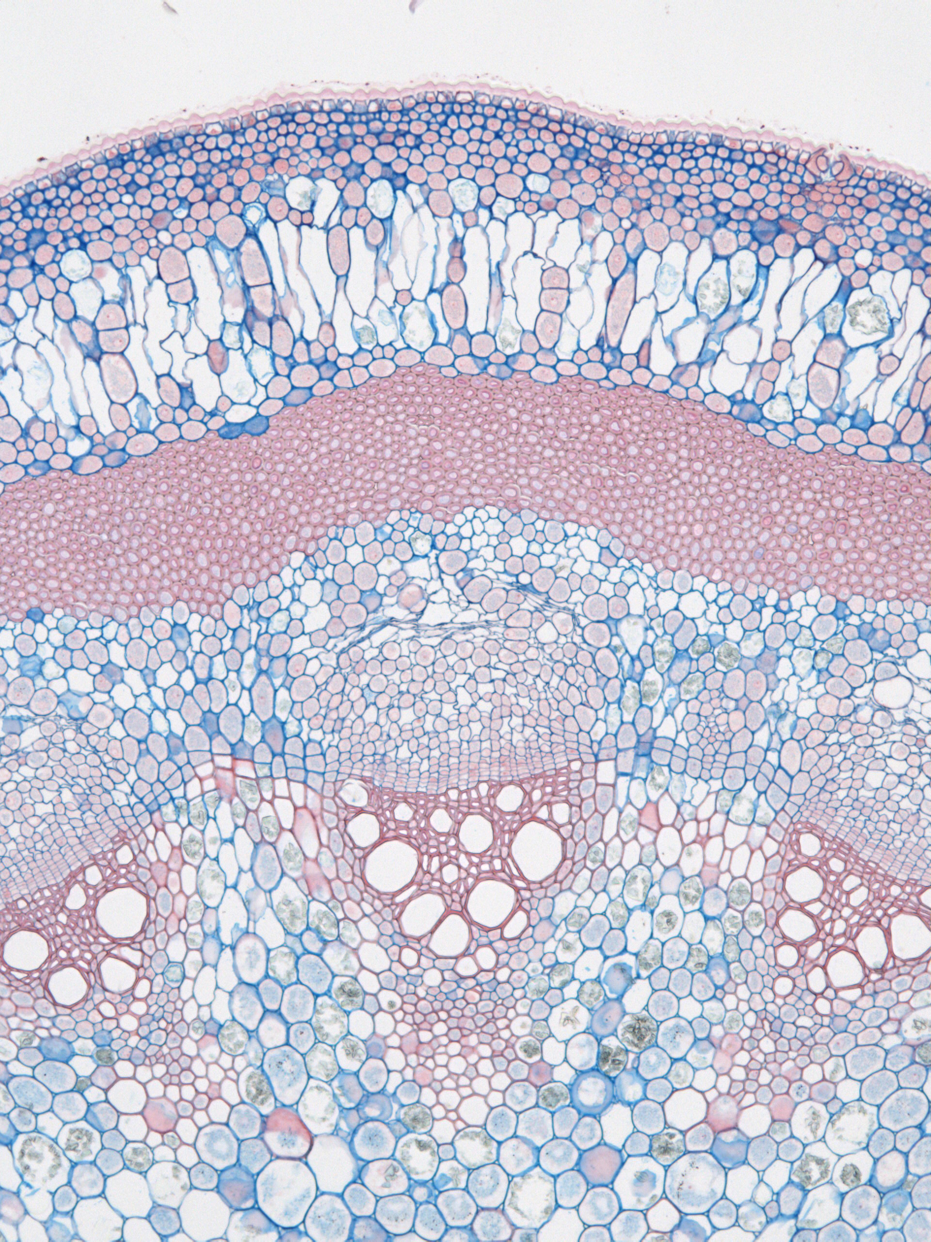 Ausschnitt aus einem Querschnitt durch einen einjährigen Spross von Aristolochia macrophylla (Pfeifenwinde). Zu sehen ist der primäre Entwicklungszustand des Sprosses. Dauerpräparat Kunststoffschnitt (Glycolmethacrylat), Färbung mit Safranin und Astralblau. Zur Bezeichnung einzelner Gewebe den Mauszeiger über das Bild bewegen (Notizfunktion).